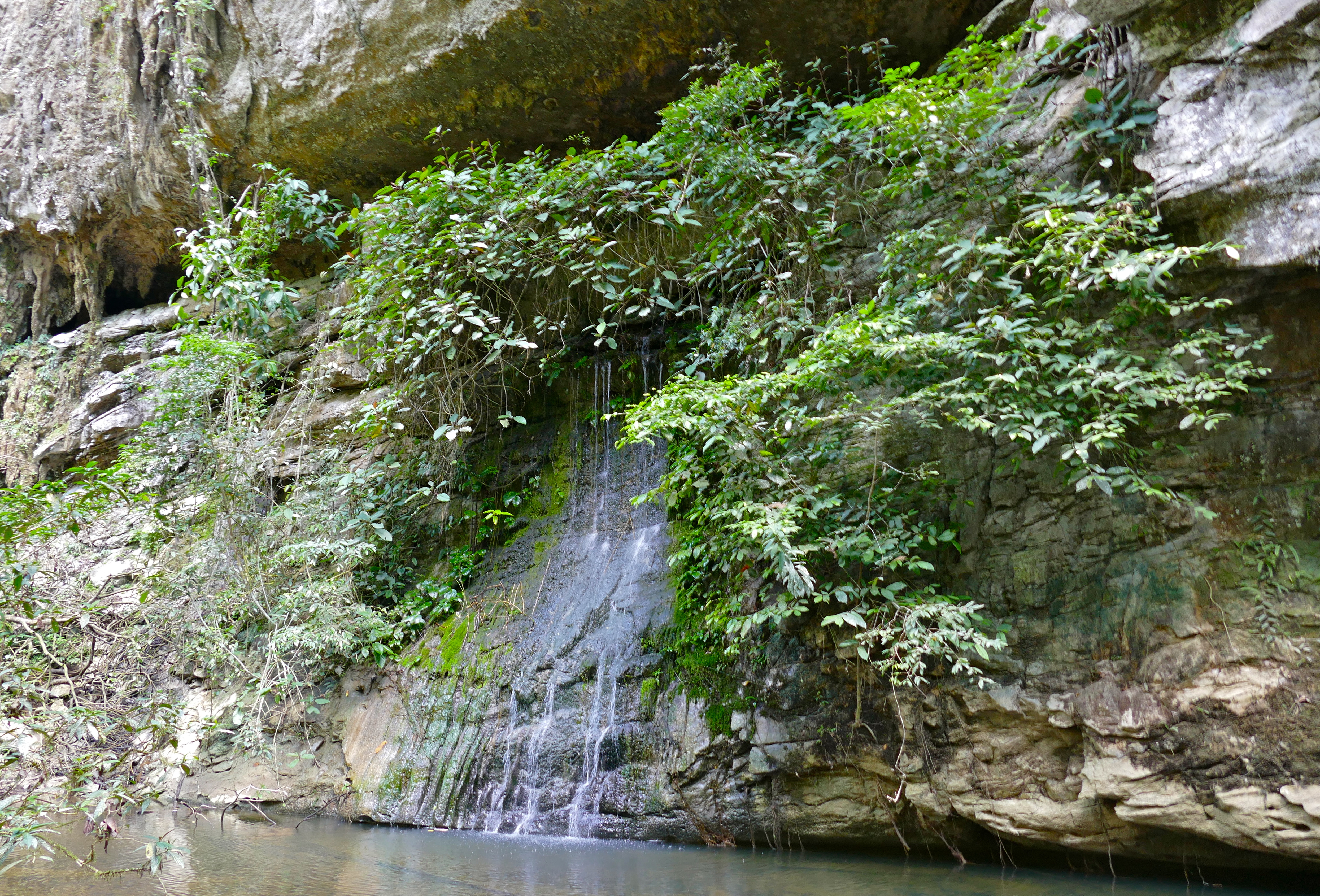 Mulu NP, Sarawak, MALAYSIA